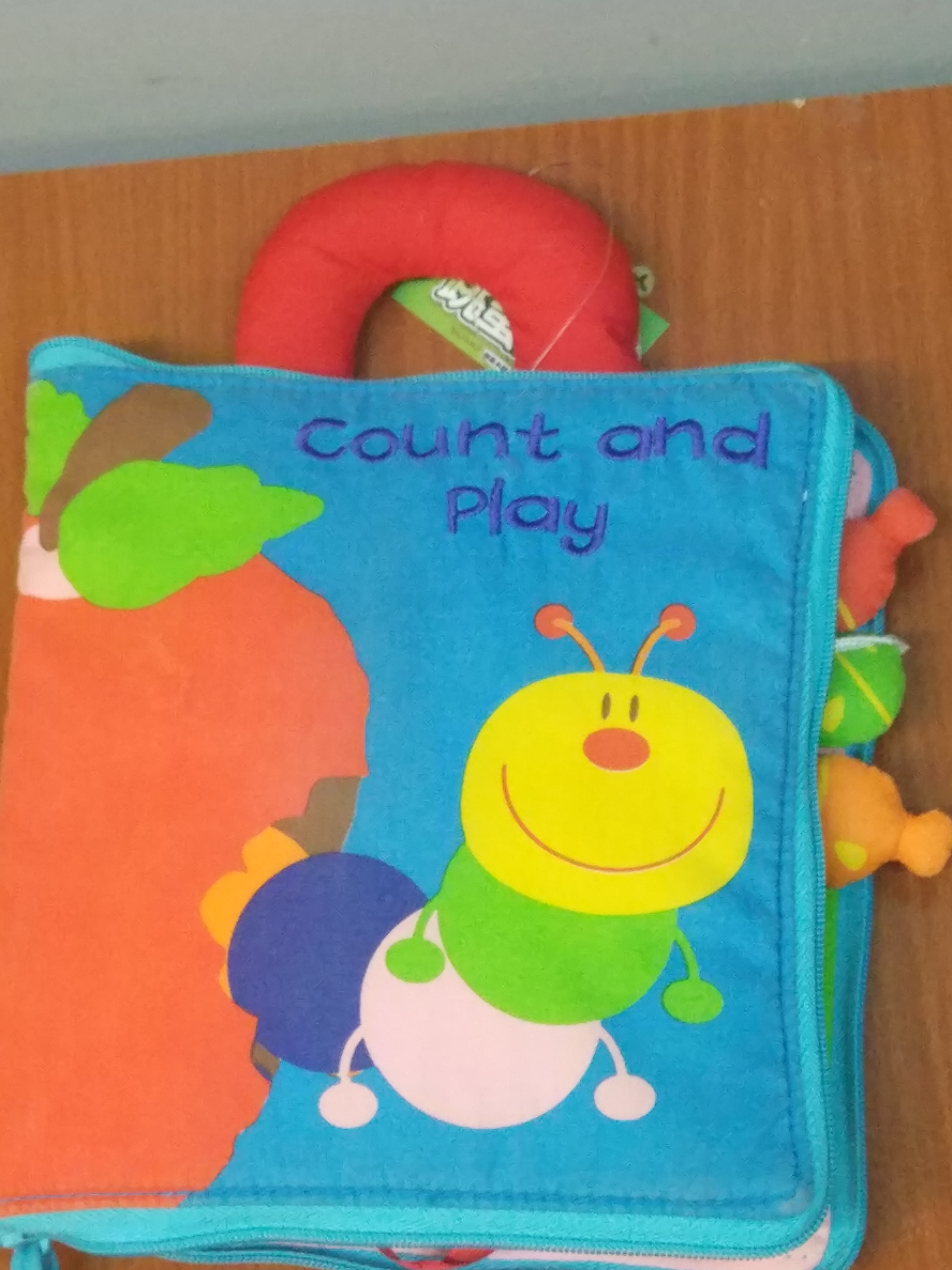 一本布書封面